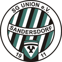 Logo Union Sandersdorf